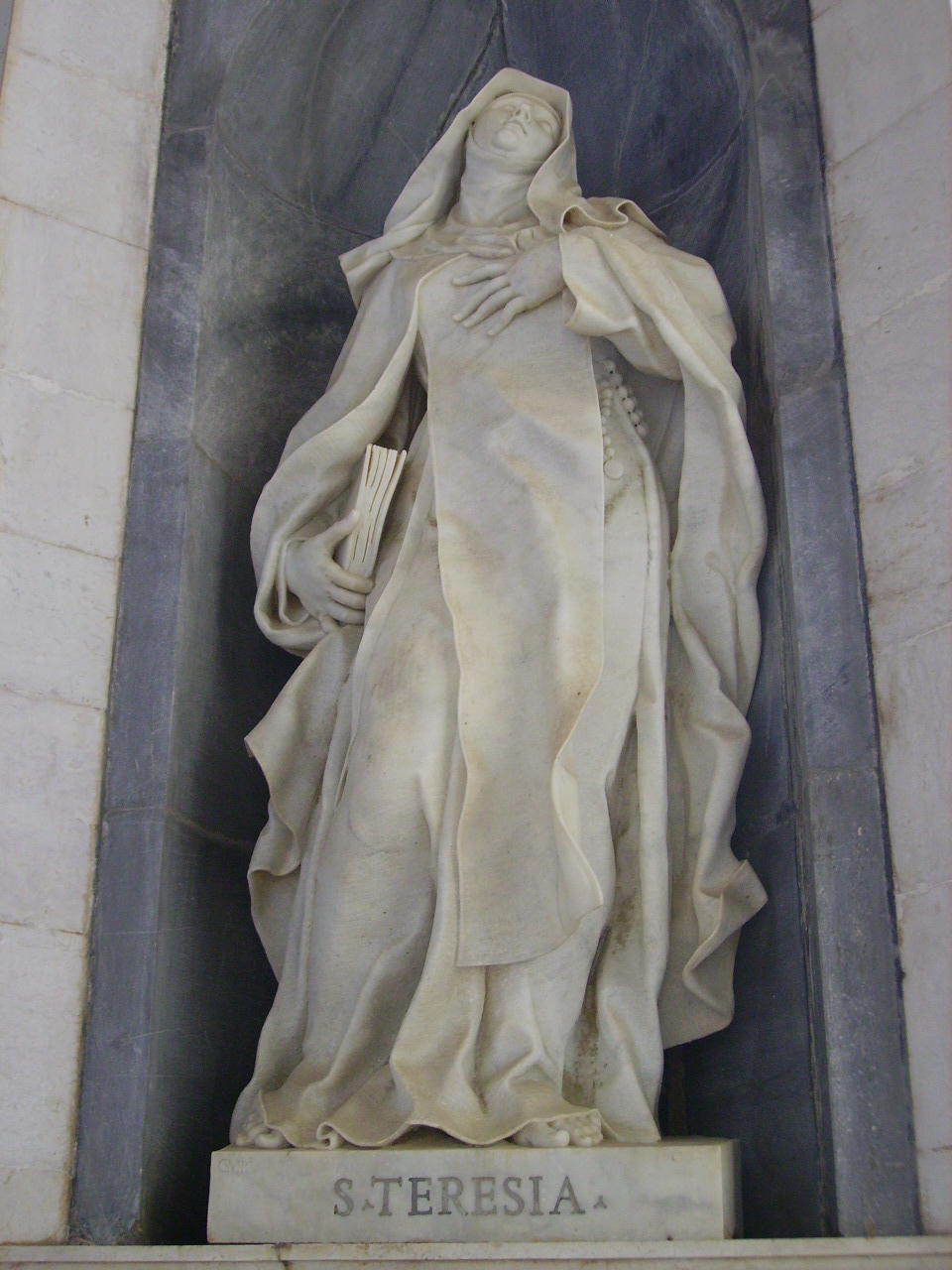 Estàtua de Santa Teresa al Palau de Mafra